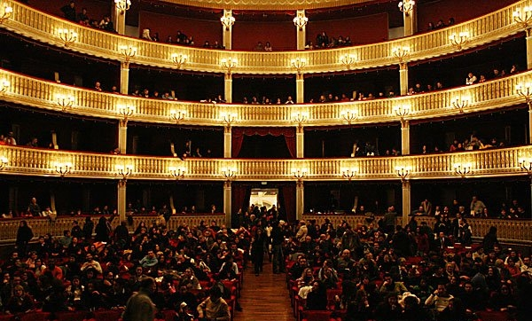 Teatro di tradizione A. Rendano, Cosenza, Italy